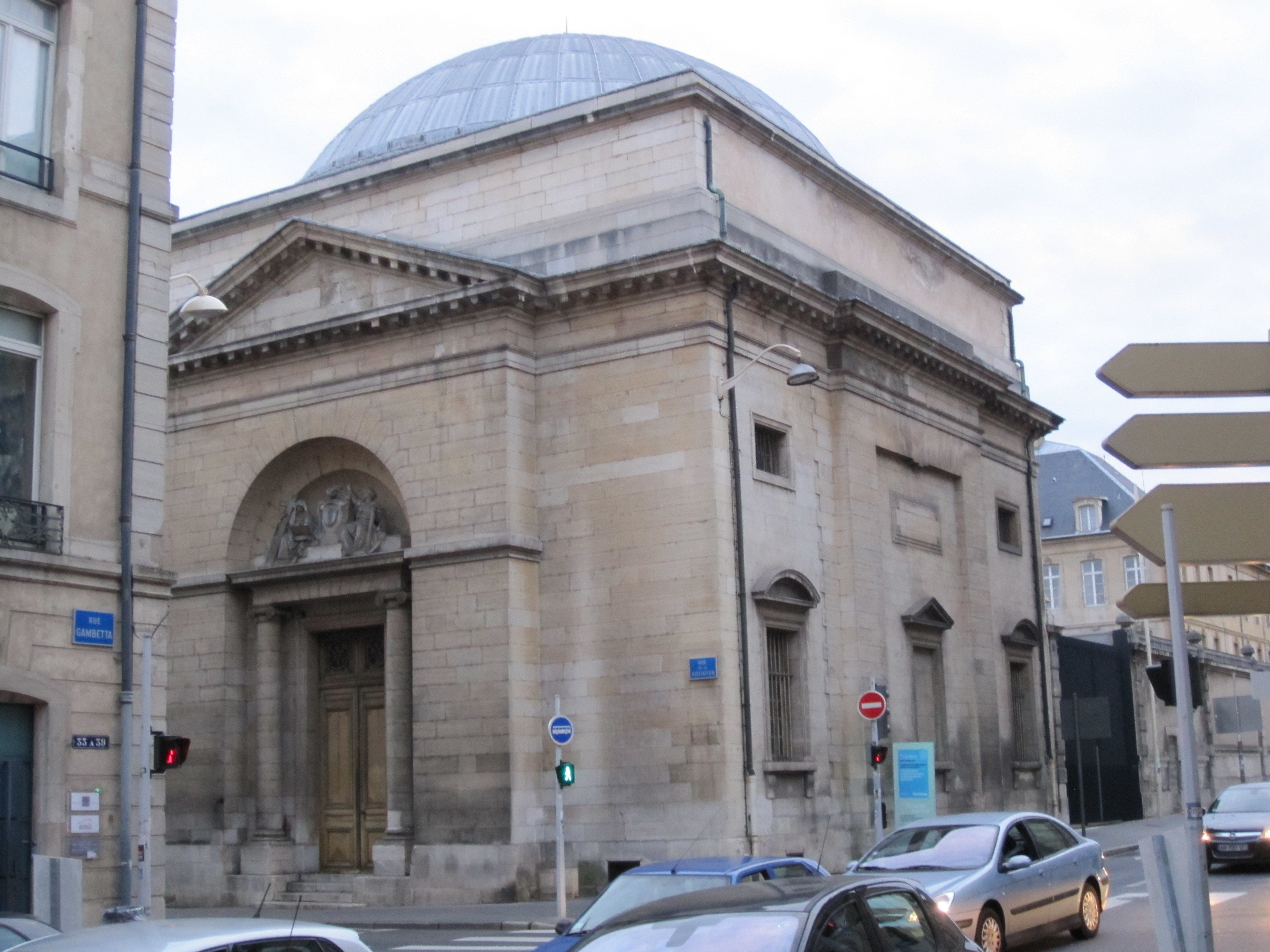 Chapelle de la Visitation de Nancy (Meurthe-et-Moselle, France), actuel lycée Henri Poincaré.